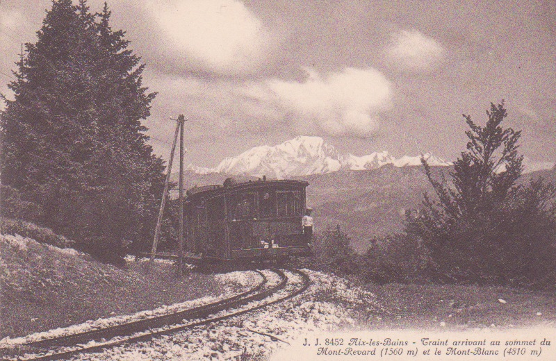 Train arrivant au sommet du Mont Revard.